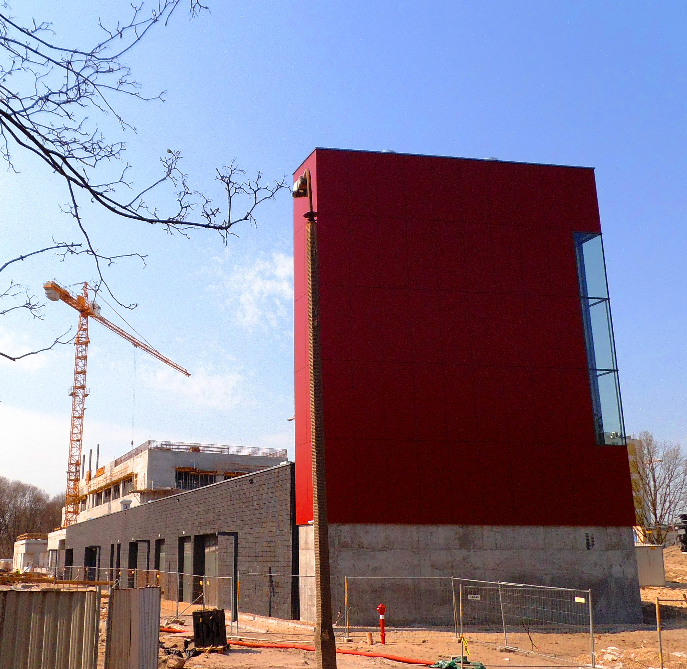 Kotłownia, trafostacja, WSZ w Toruniu, kwiecień 2018 rok